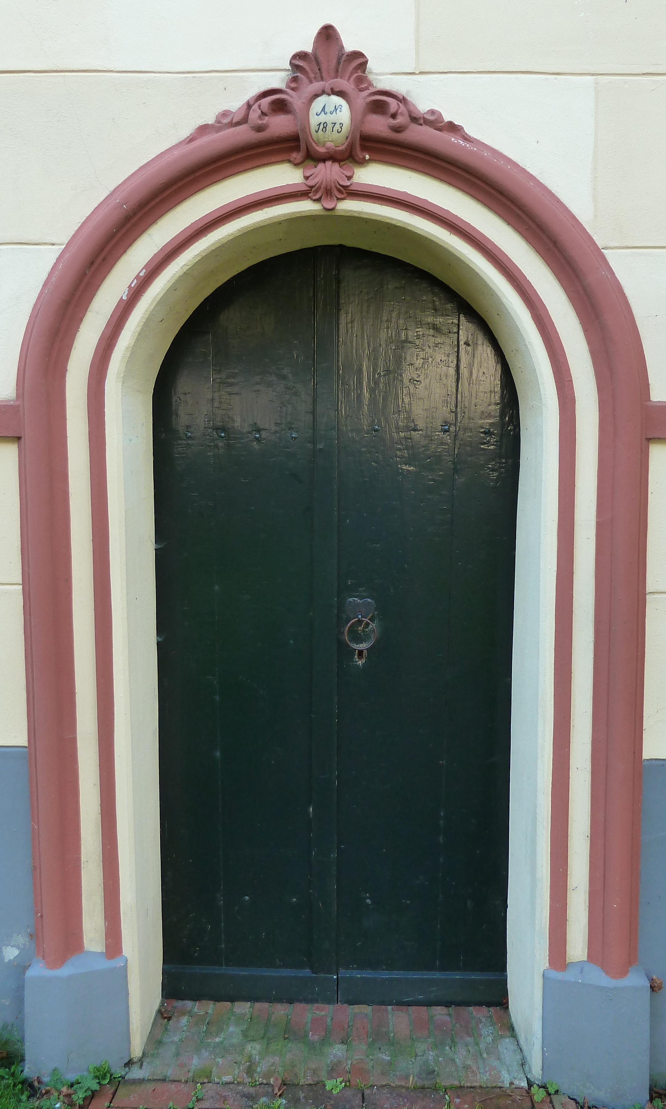 Ingang naar de hervormde kerk van Visvliet.